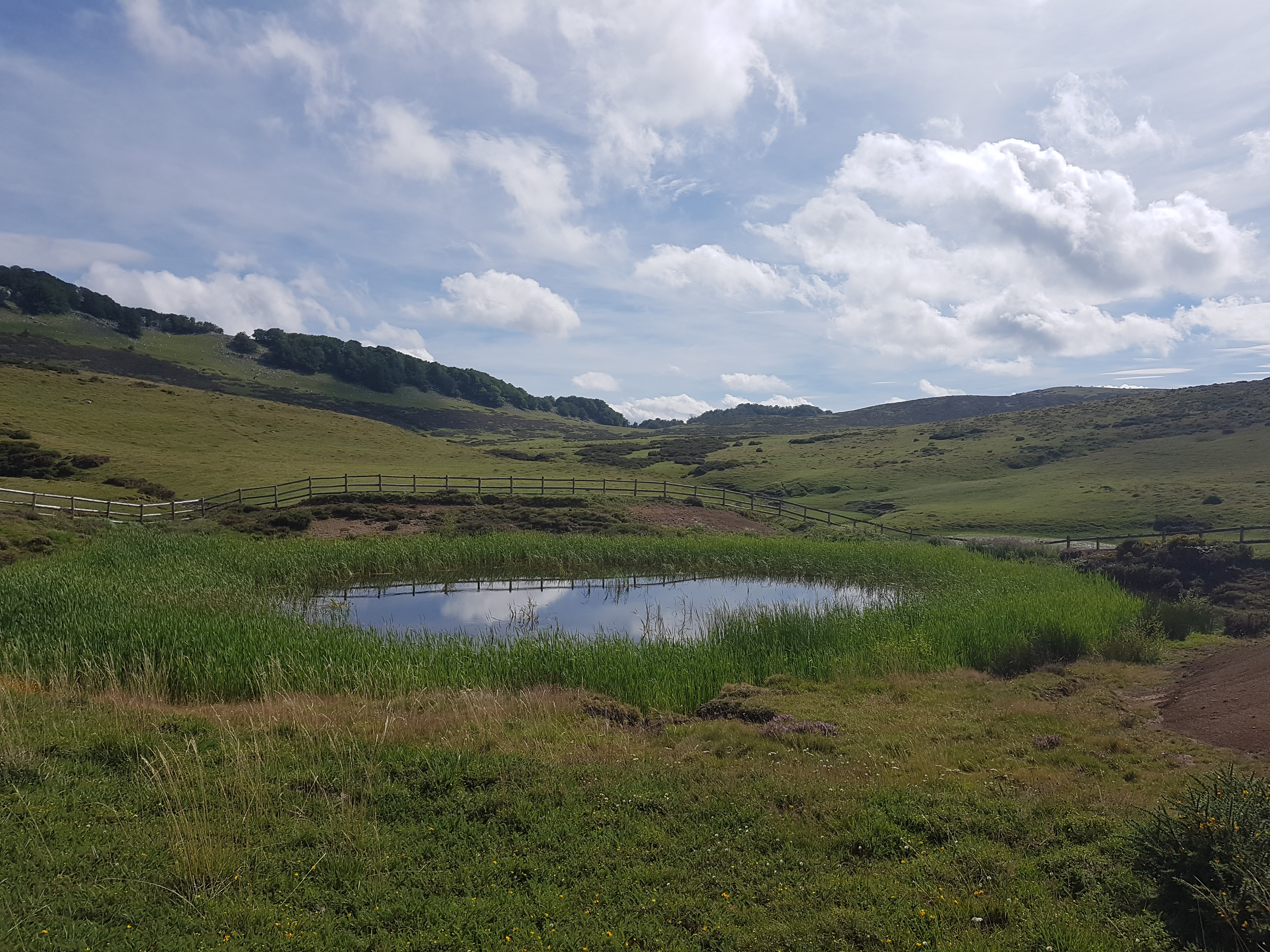 Unako putzua edo Unagako putzua Aralar mendilerroan dagoen ur putzu natural bat da